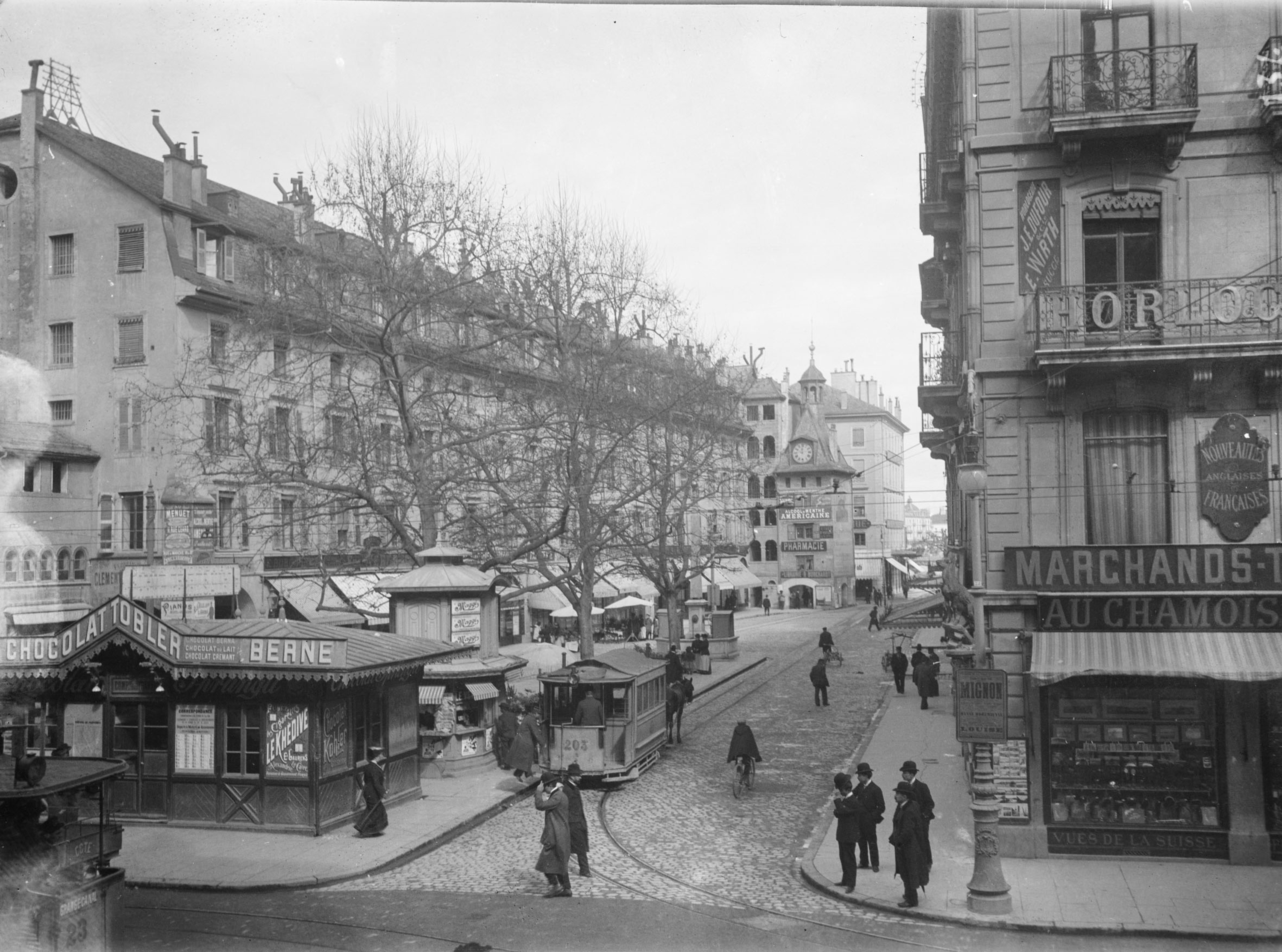 Vue de la place du Molard avec au centre : un véhicule hippomobile de la CGTE (numéro 203), le kiosque de la CGTE, un kiosque à journaux, la fontaine du Molard et au fond la Tour du Molard. La place est pavée, outre le tramway, un cycliste y circule. Le kiosque de la CGTE porte de la publicité pour le « Chocolat Tobler, Berne ». Le kiosque à journaux porte de la publicité pour « Maggi ». Le magasin à droite, à l'angle de la rue de la Croix-d'Or, vend des « Vues de la Suisse » ; il porte une enseigne « Au Chamois », une statue de chamois est visible à l'angle du bâtiment.